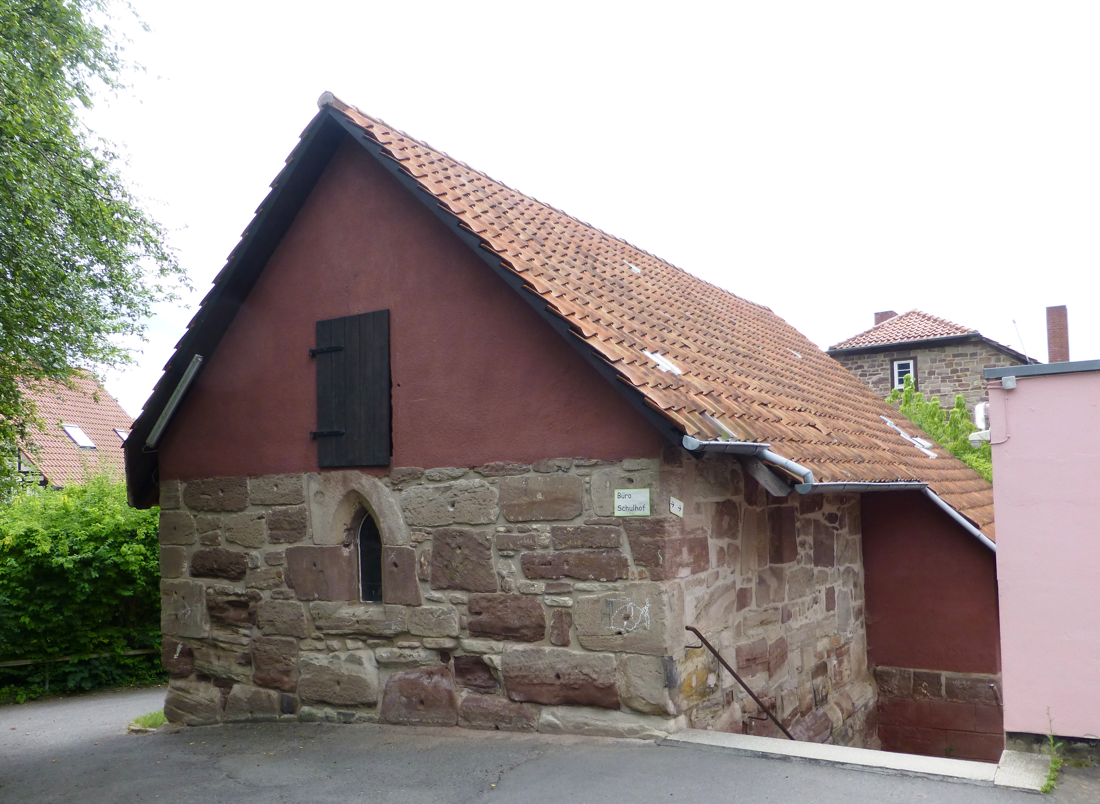 Baurest der ehemaligen Kapelle des 1460 durch die Herren von Uslar gestifteten Hospitals in Reinhausen, heute Gemeinde Gleichen, Landkreis Göttingen, Südniedersachsen. Nach Teileinsturz ist nur der nordöstliche Teil des gewölbten Untergeschosses, wohl ehem. Kapellenraum, erhalten.